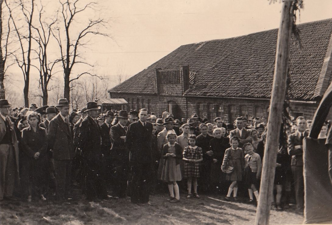 Rede zu einer Feierlichkeit auf dem Totdenberg bei Groß Berkel. Im Hintergrund der Tanzsaal auf dem Festplatz